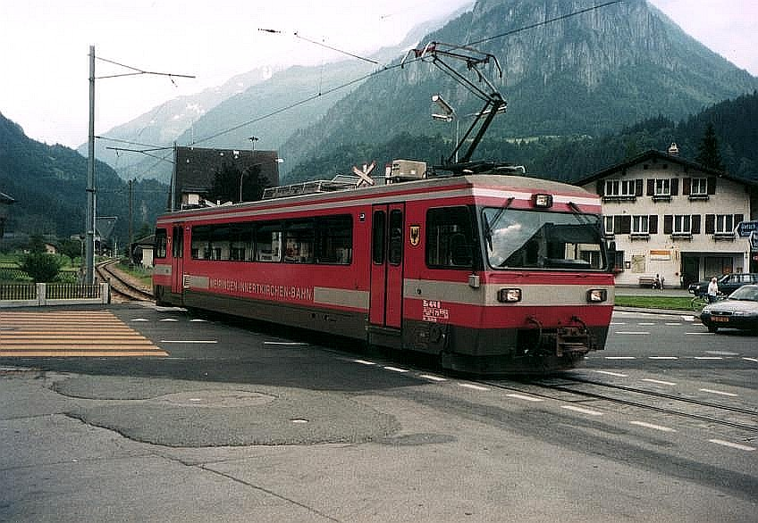 Description